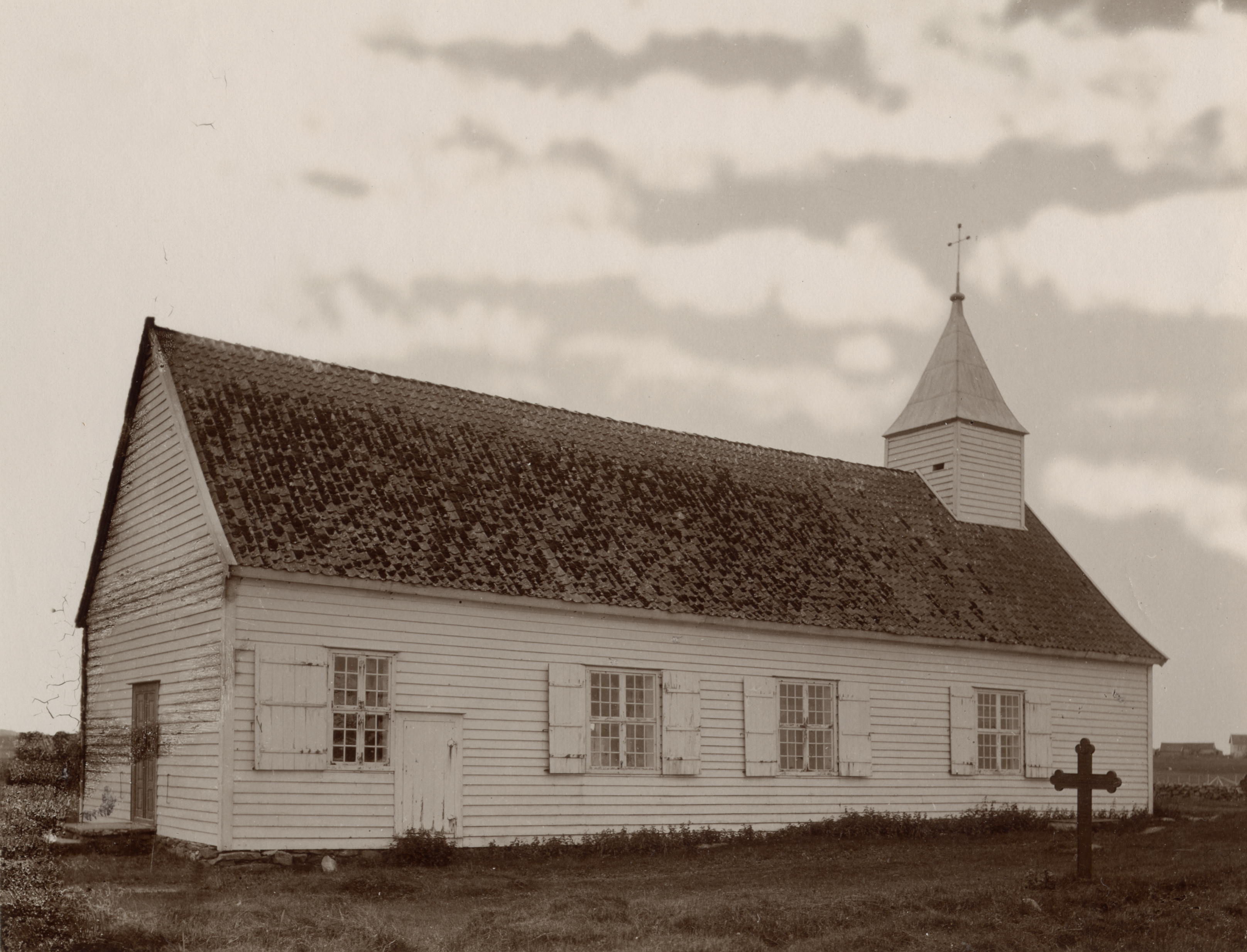 Aakra gamle kirke, Åkra gamle kirke i Åkra, Rogaland